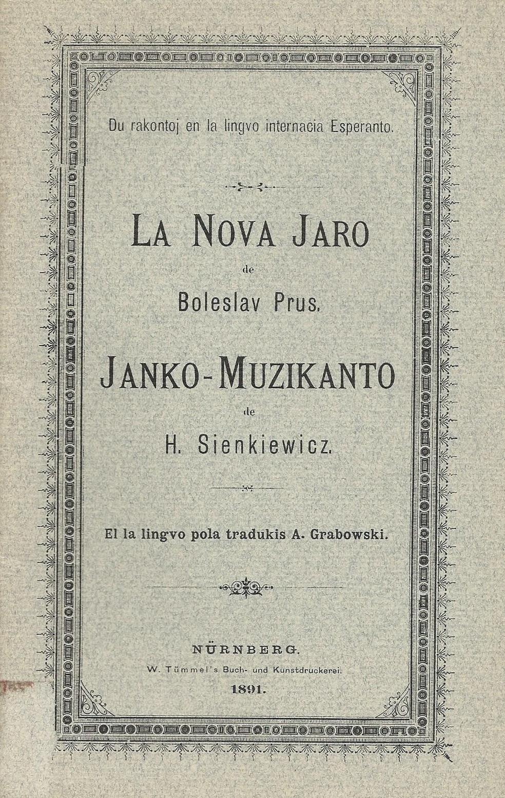 librokovrilo de "La Nova Jaro & Janko-muzikanto", 1891(1967)